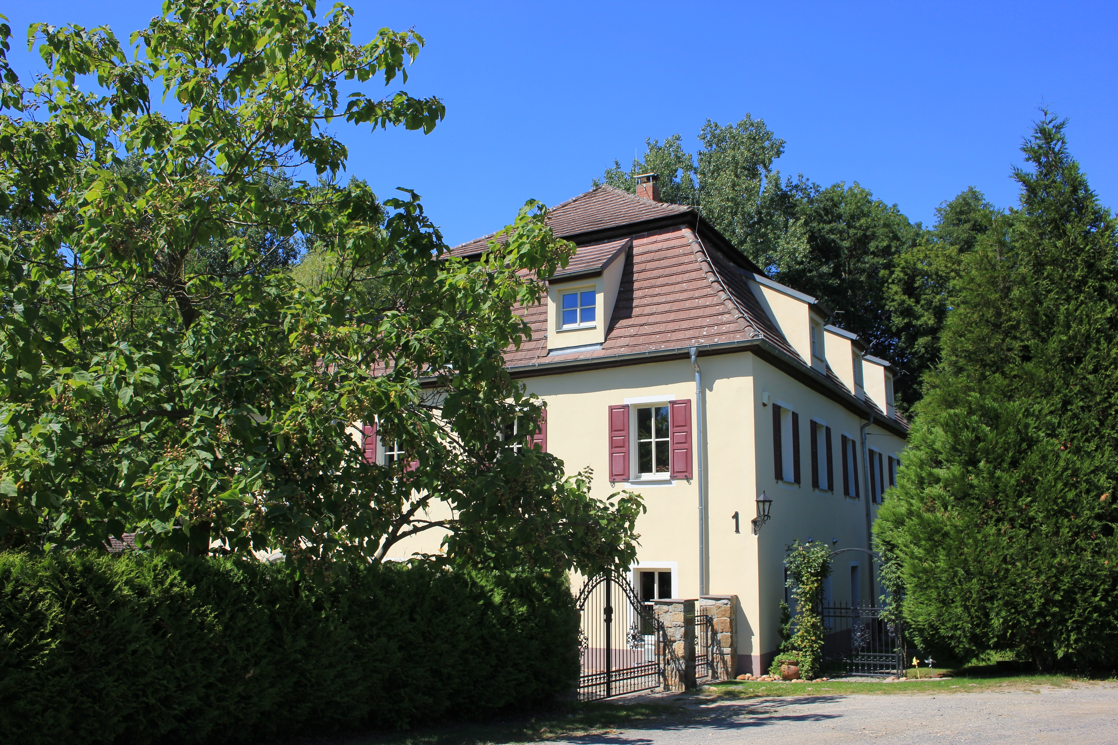 Hornjoserbsce: Knježi dom na ryćerkuble w Dobrošicach, čo. 1 (kulturny pomnik).